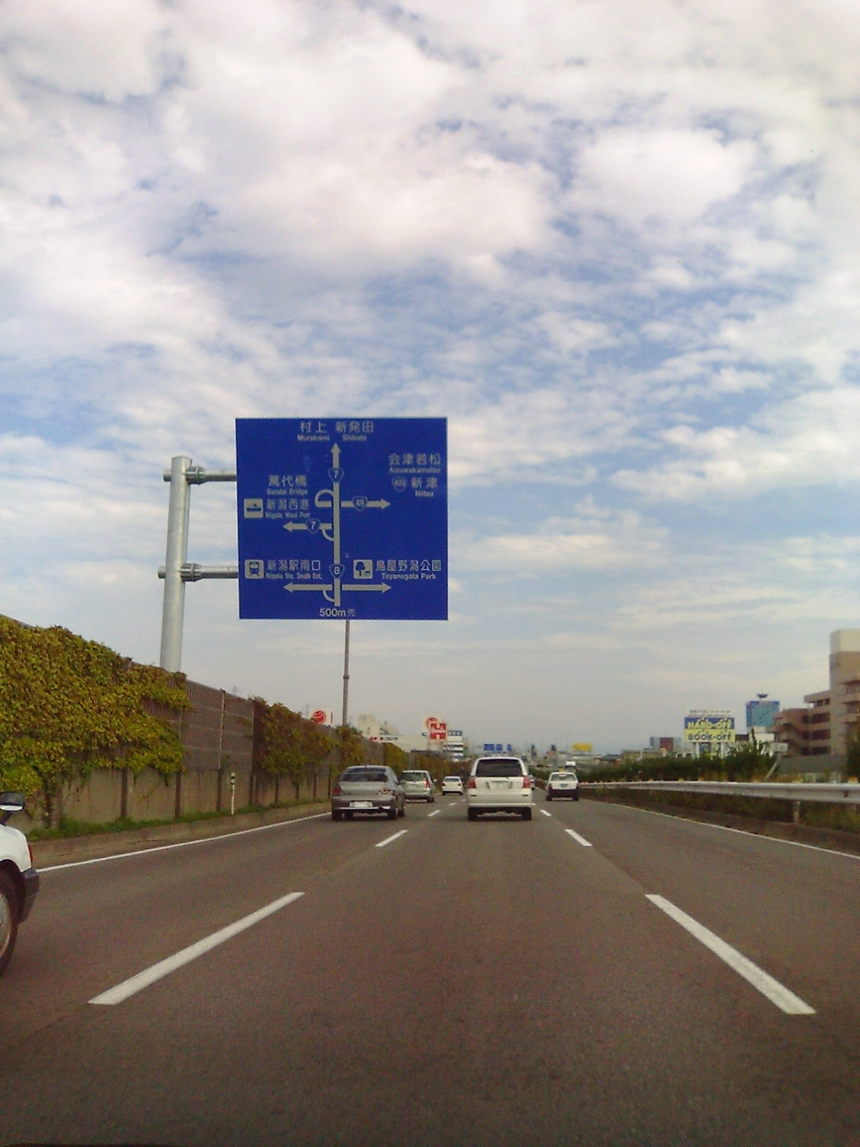 新潟バイパス弁天IC・紫竹山IC付近（桜木-弁天間）。